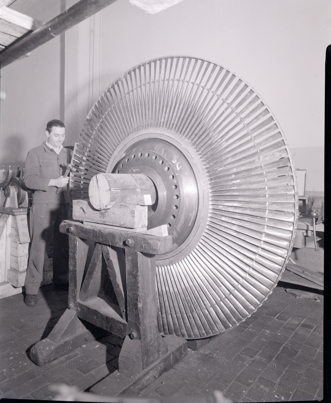 Servizio fotografico : Italia, 1958 / Paolo Monti. - Buste: 2, Fototipi: 2 : Negativo b/n, gelatina bromuro d'argento/ pellicola ; 10x12. - ((Serie costituita da 2 negativi identificati con i nn.: 20011, 20013. Numerazione parallela: 1130, 1132. La suddetta serie è contenuta nella scatola identificata con la numerazione 20069-20184. Sulla scatola manoscritto con pennarello nero: "Tosi/ 750-1080". La scatola è a sua volta contenuta in una scatola grande col coperchio giallo.